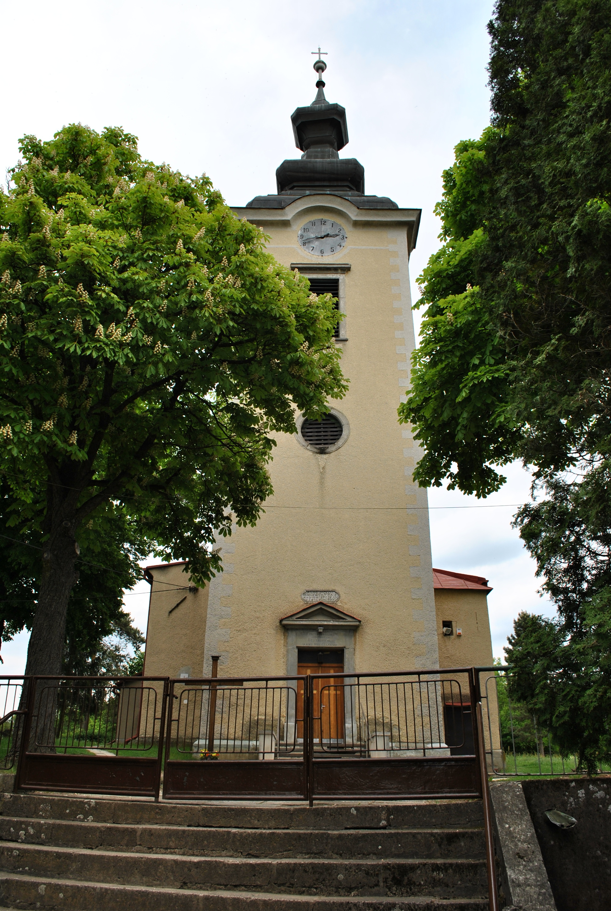 Hontianske Nemce, okr. Krupina - rímsko-katolícky kostol Sv. Martina